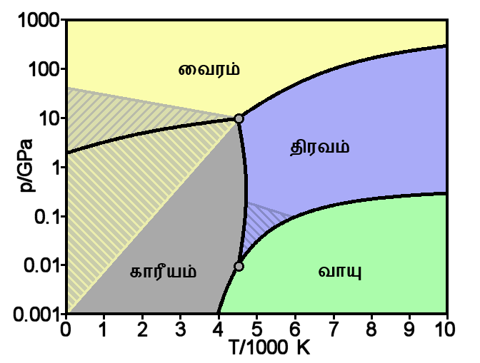 கார்பனின் பௌதீக நிலைகள்- வெப்பநிலை, அமுக்கத்துக்கேற்ற படி மாறுபடல்.